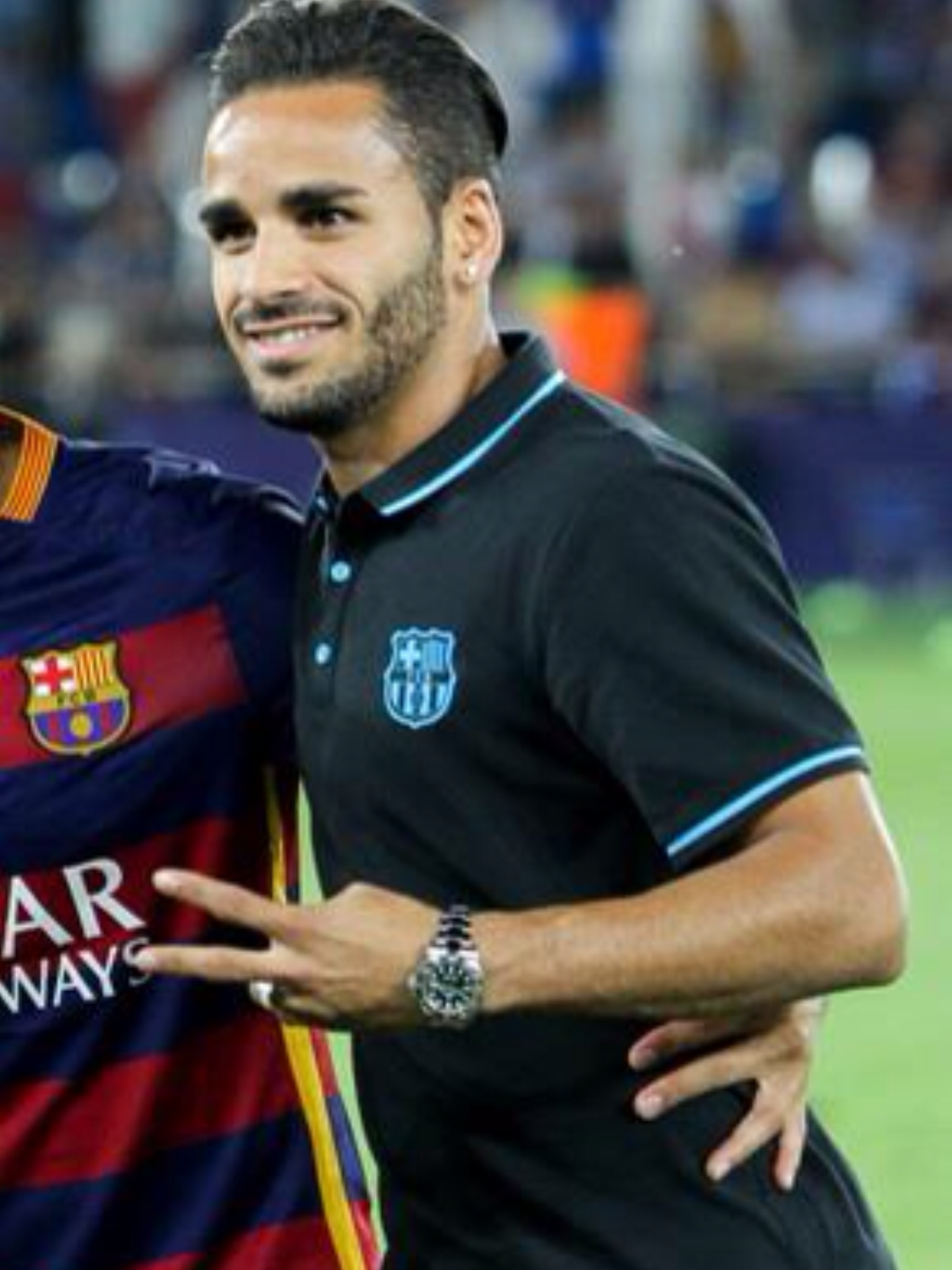 דוגלאס במדי ברצלונה, הסופר קאפ האירופי 2015